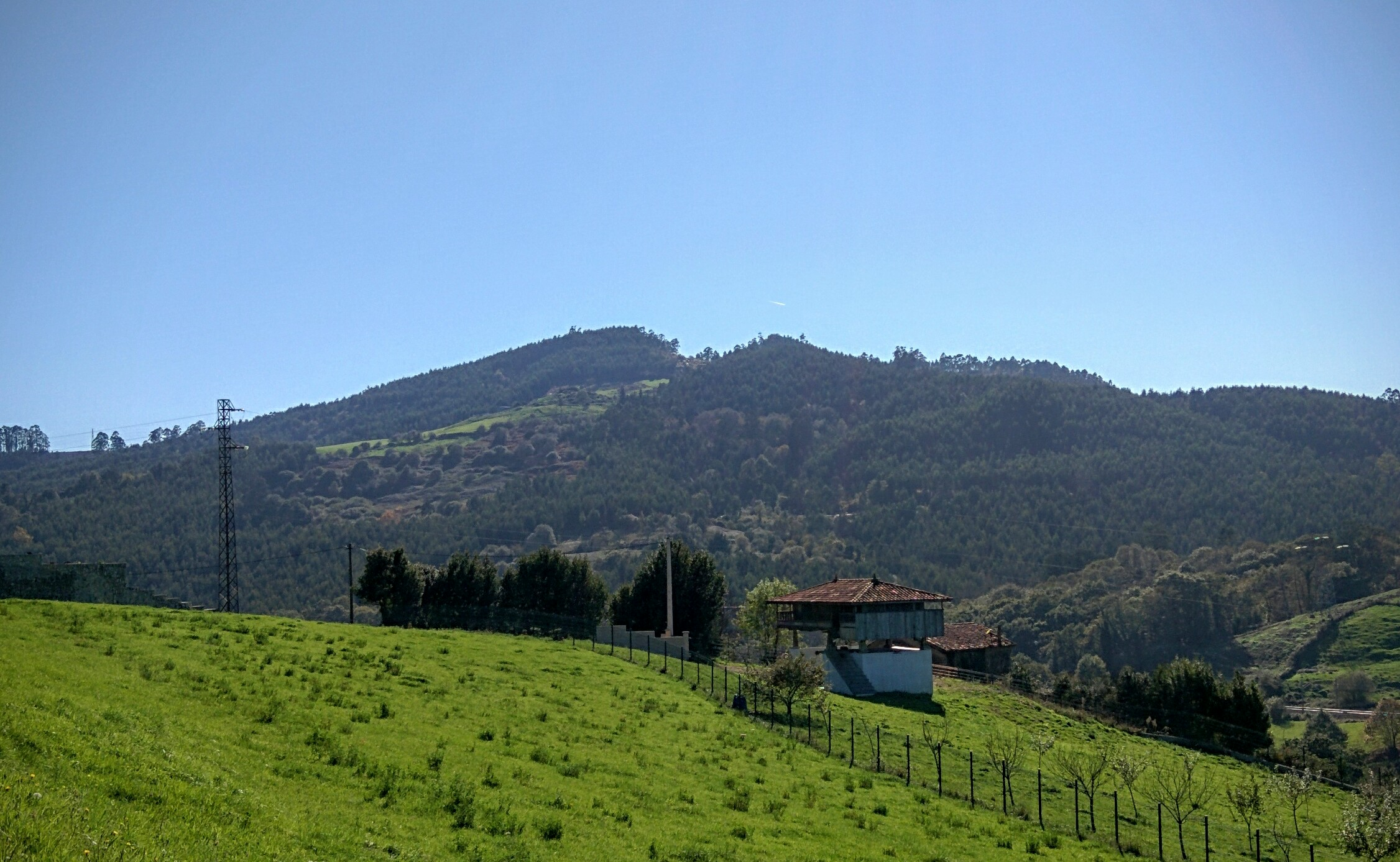 Santofirme desde Veyo